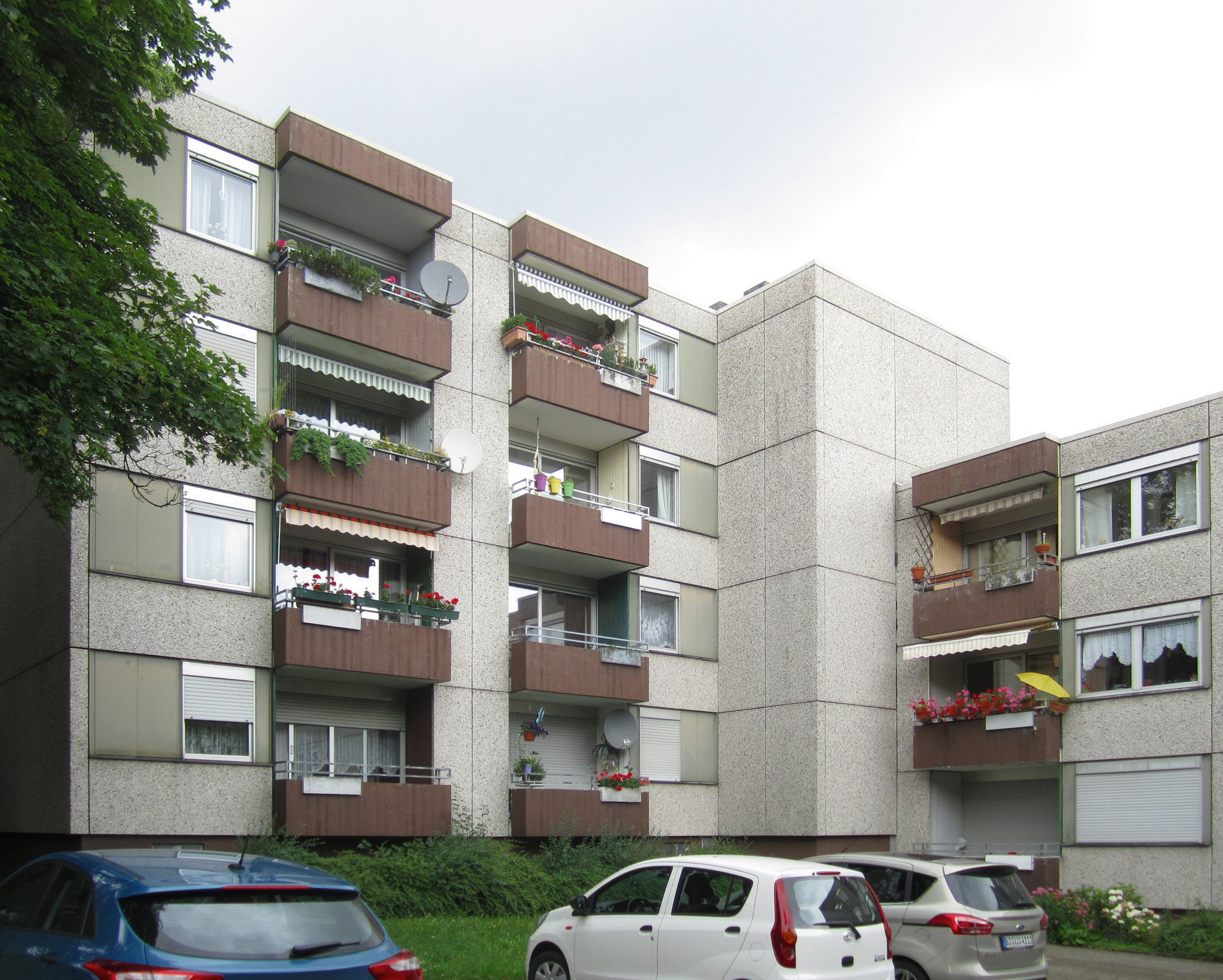 Bochum, Wohnungsbau ausgeführt von der Dortmunder Firma Nickel + Eggeling GmbH & Co. KG